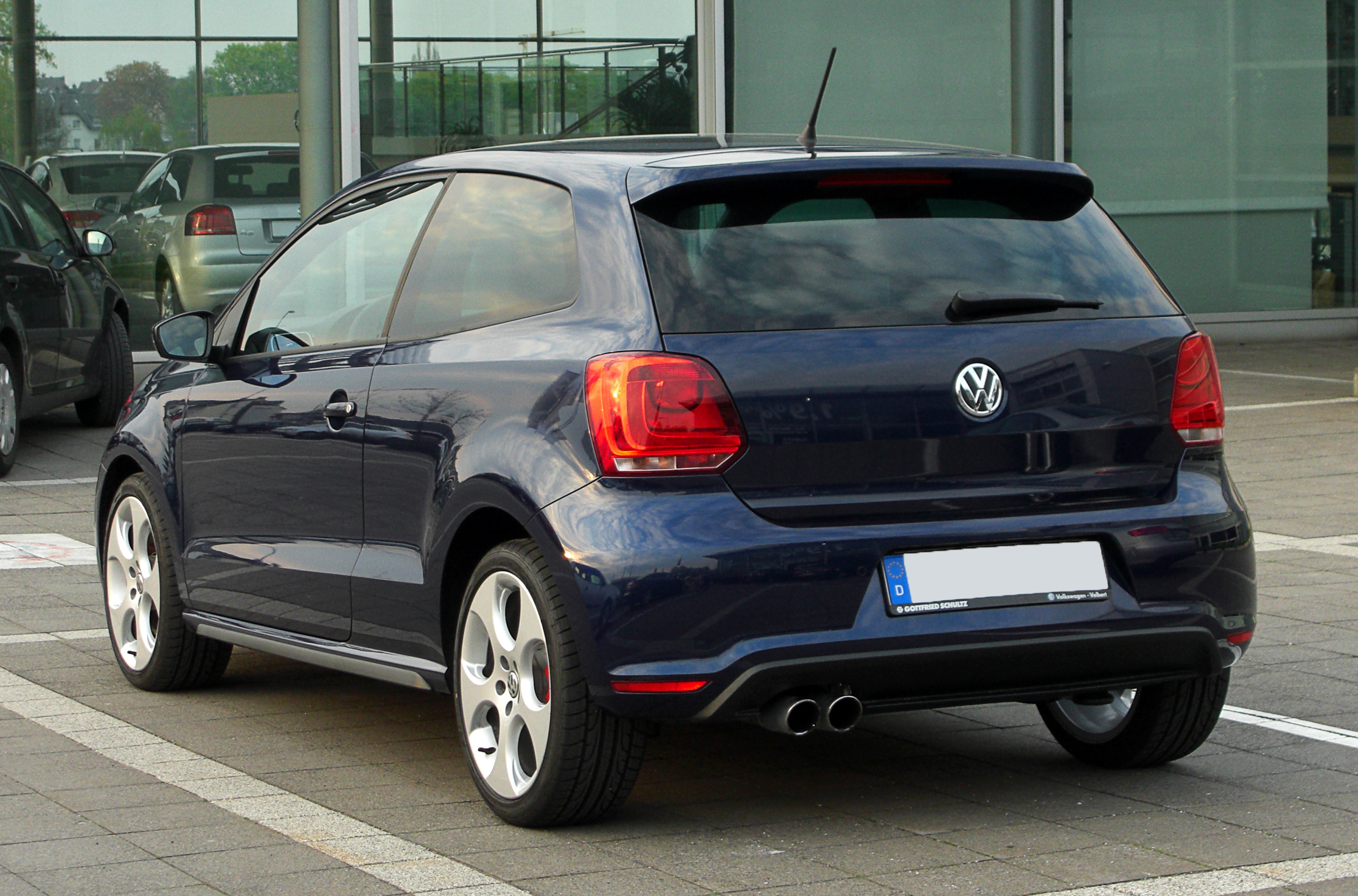 VW Polo GTI (V)